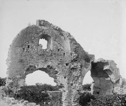 Edifici en ruïnes de la vil·la romana de Centcelles. Joaquim Bordons i Wehrle (1908-06)